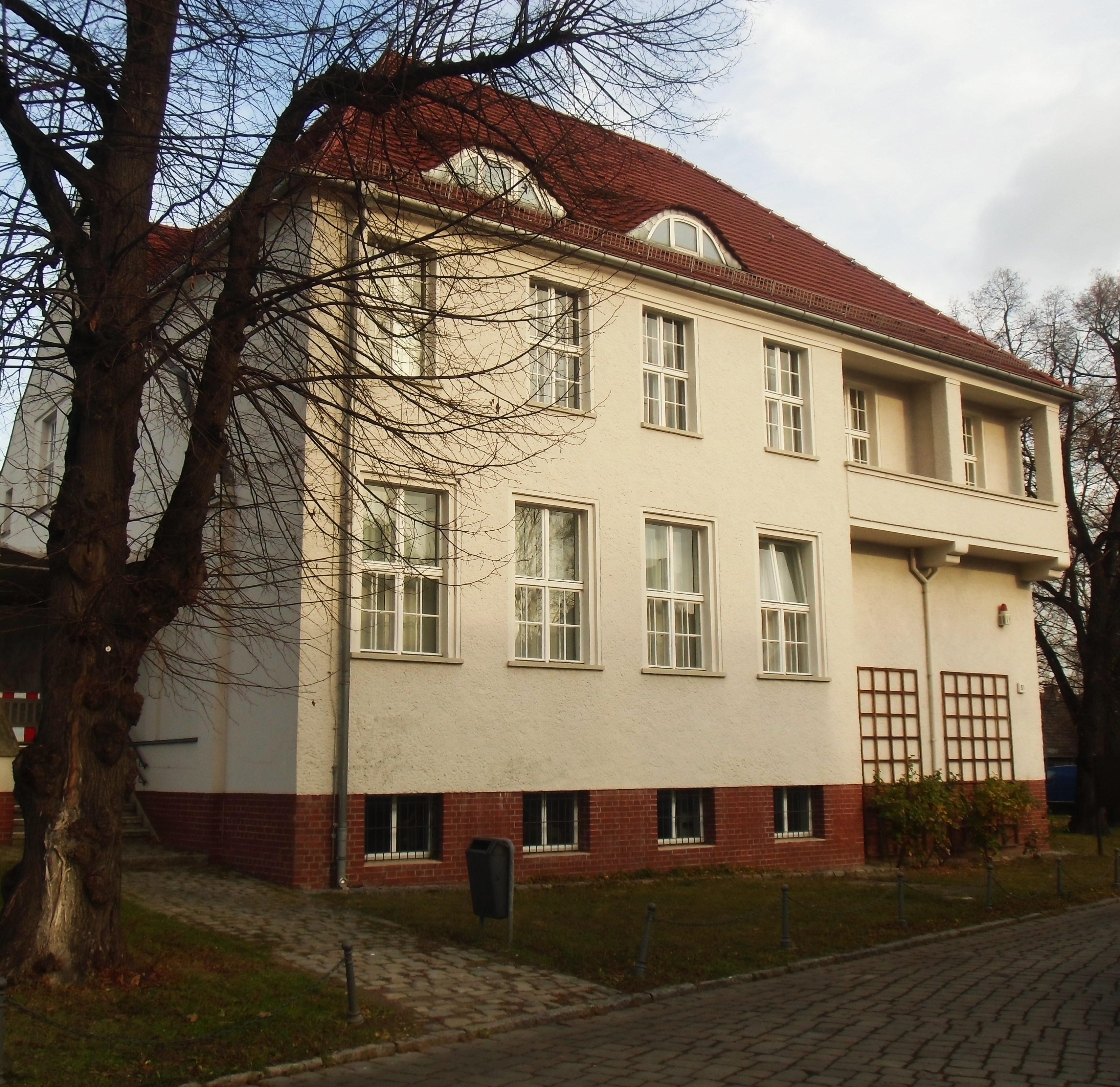 Denkmalgeschützte ehemalige Dorfschule, jetzt Bezirksmuseum im Ensemble Alt-Marzahn, erbaut 1911-1912